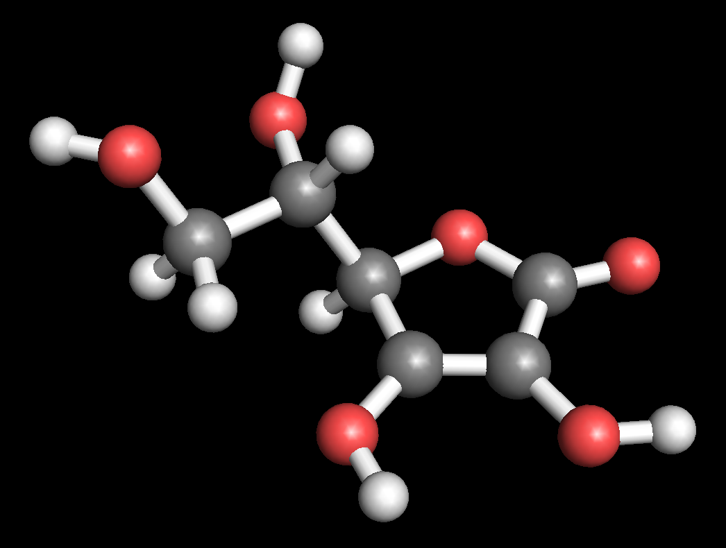 3D-Ball&Stick-Darstellung der L-Ascorbinsäure